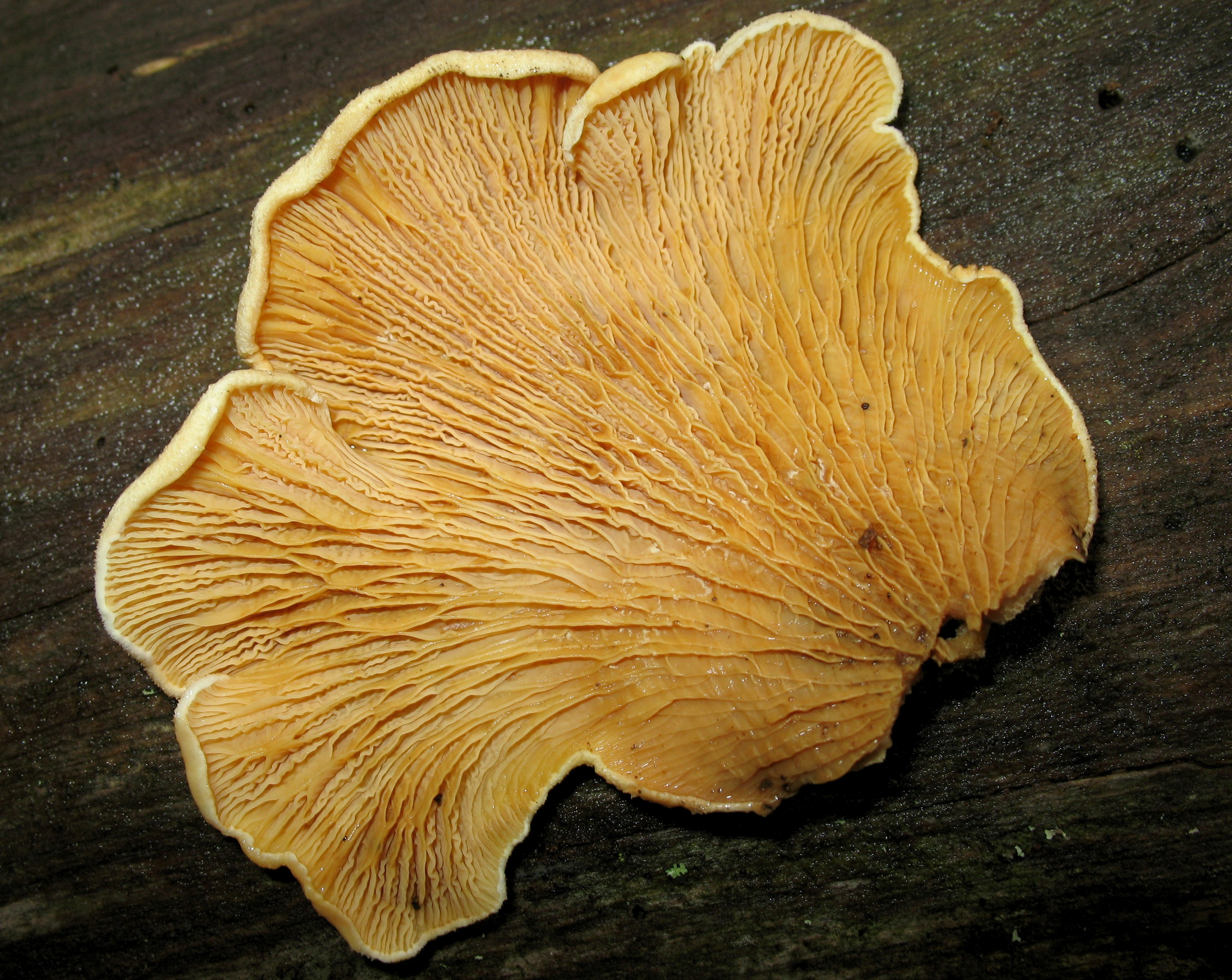 Tapinella panuoides (Batsch) E.-J. Gilbert